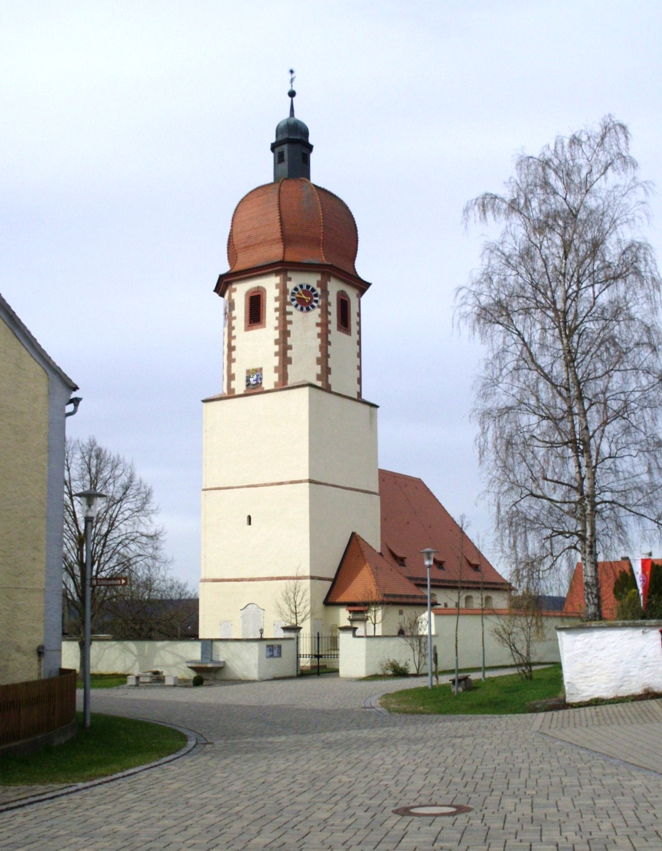 Alesheim im mittelfränkischen Landkreis Weißenburg-Gunzenhausen, Evang.-luth. Pfarrkirche St. Emmeram